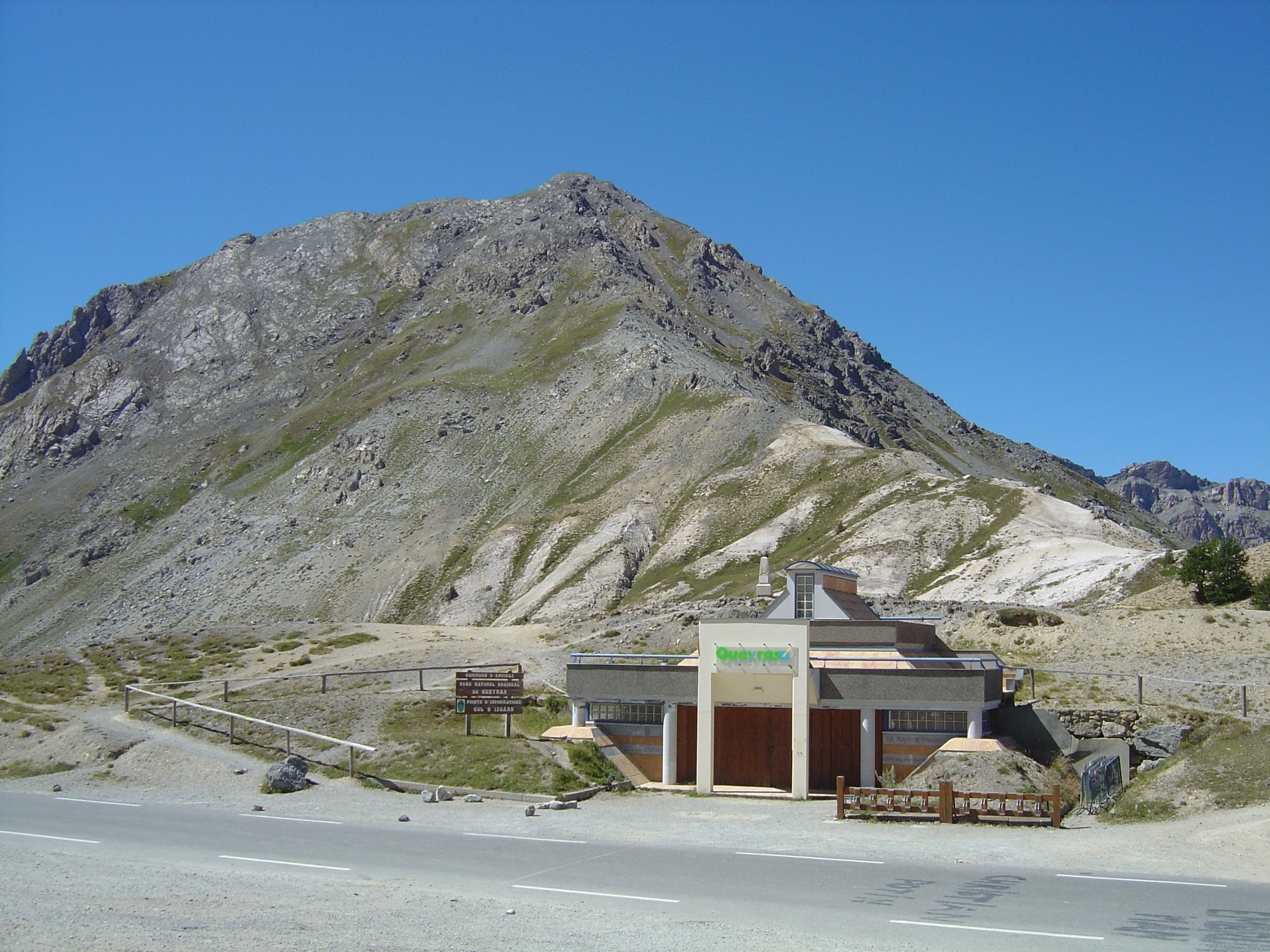 Au sommet du col d'Izoard, le petit musée du Tour de France